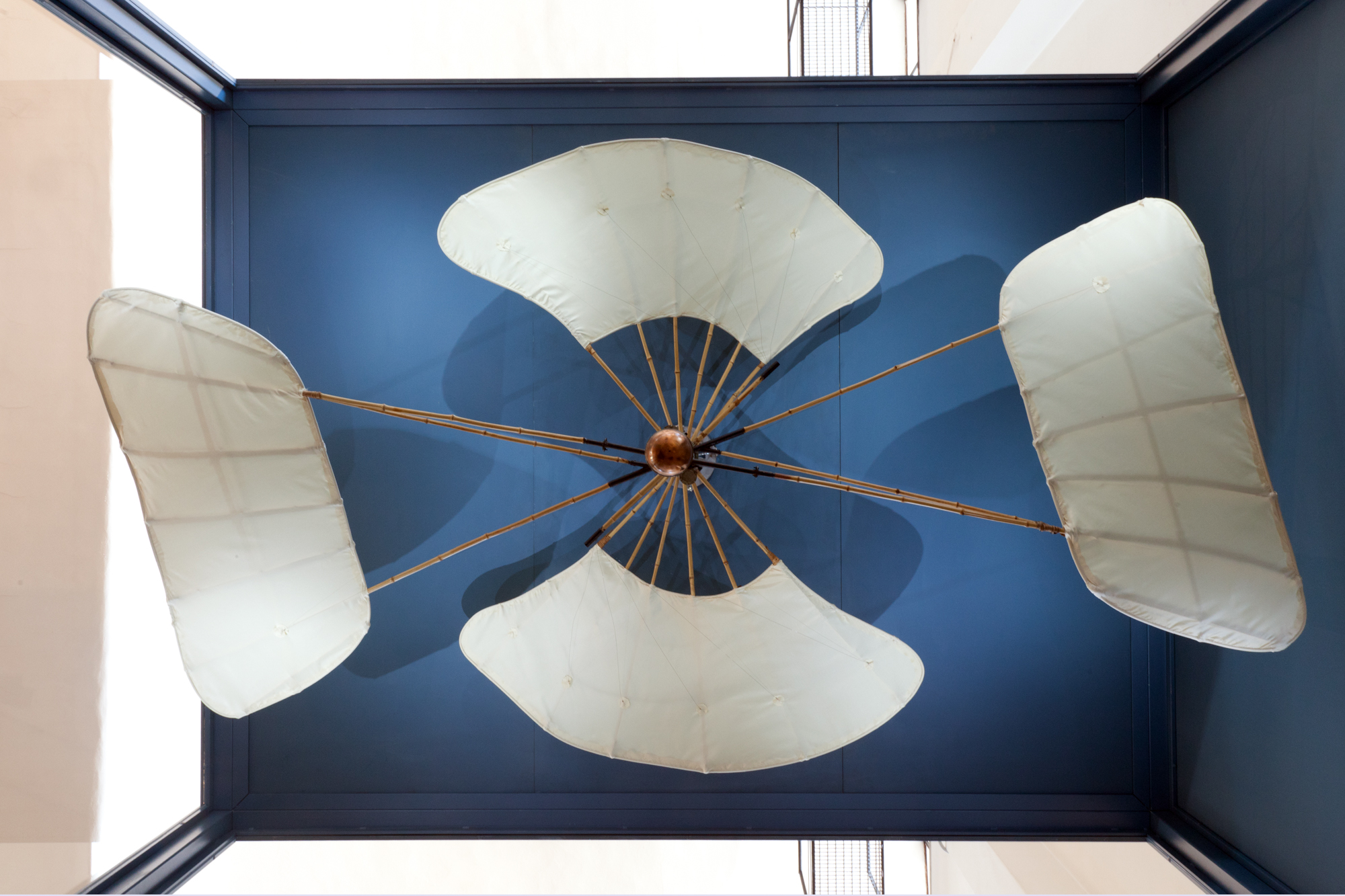 Elicottero sperimentale Enrico Forlanini. Modello esposto al Museo nazionale della scienza e della tecnologia Leonardo da Vinci, Milano.